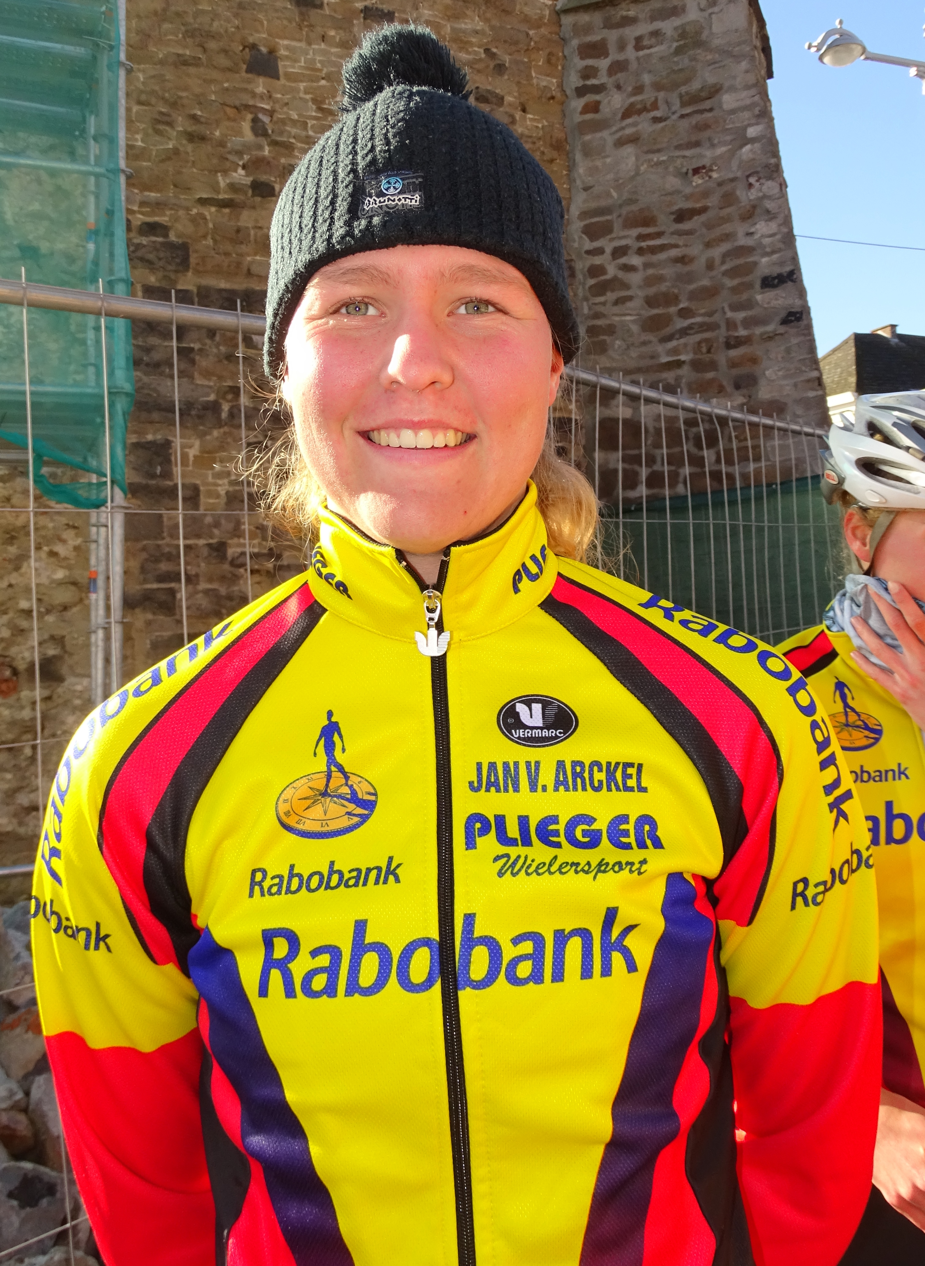 Reportage réalisé le mercredi 2 mars à l'occasion du départ du Samyn des Dames 2016 et du Samyn 2016 à Quaregnon, Belgique.